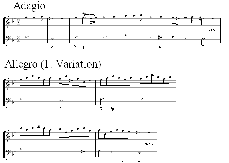 Auszug aus La Follia - Grundmotiv und erste Variation, herausgegeben von Hans-Martin Linde